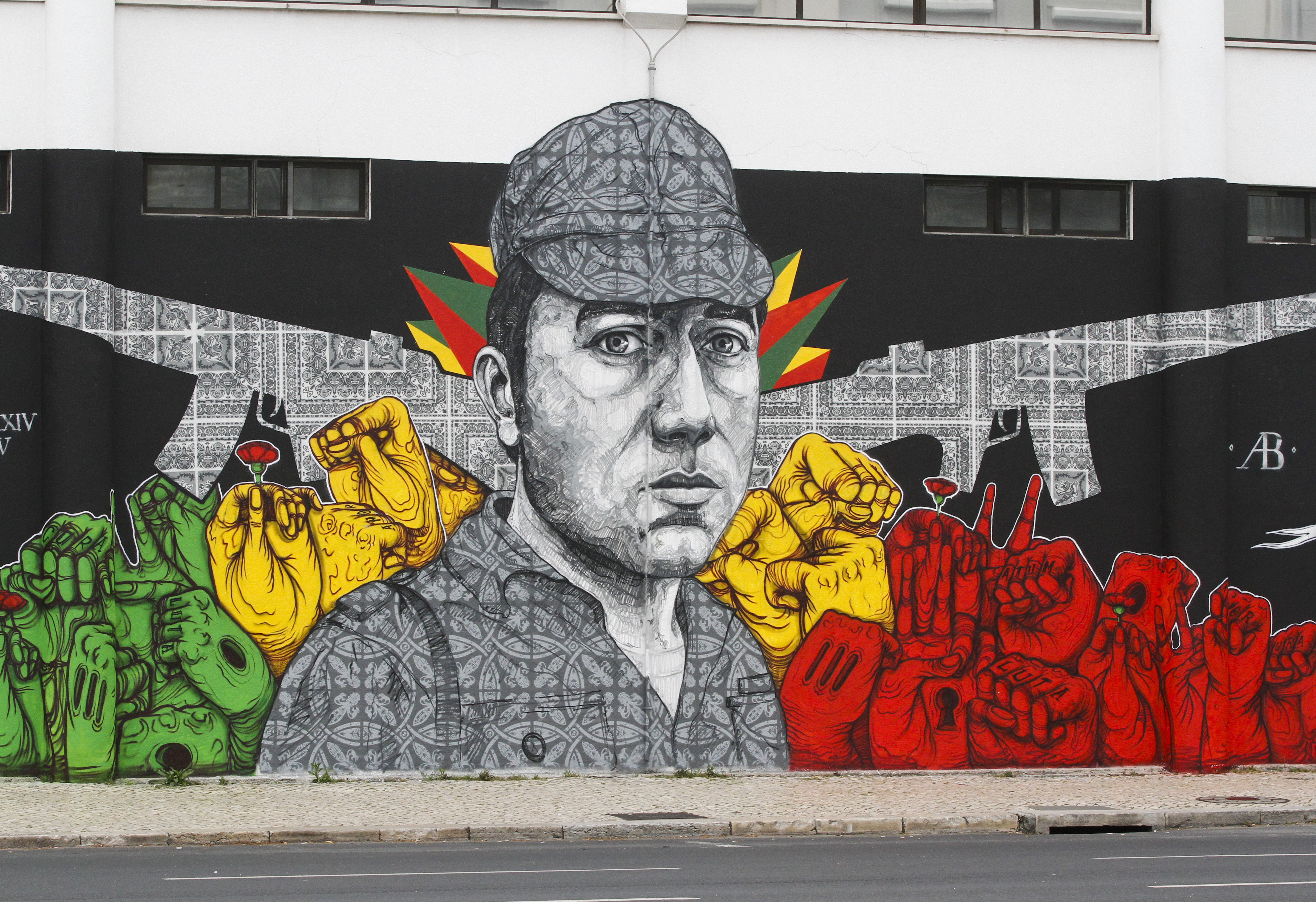 Graffiti of the icon of the 1974 Carnation Revolution in Portugal, Fernando José Salgueiro Maia, on a Lisbon wall to commemorate upcoming 40th anniversary of this event.